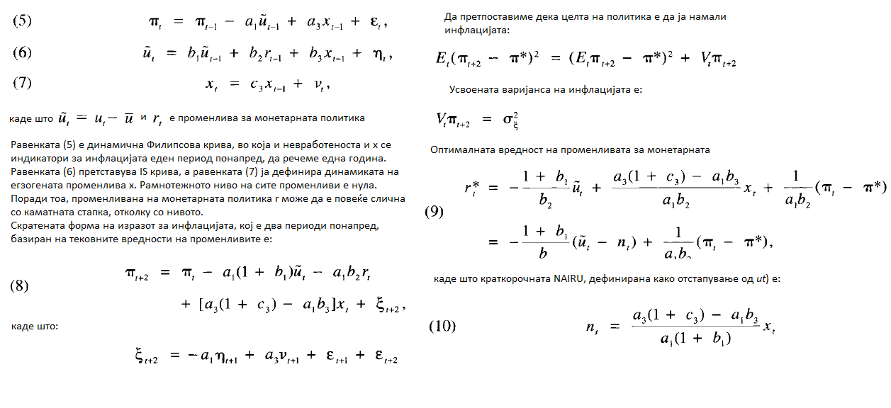 Објективна функција со инфлацијата